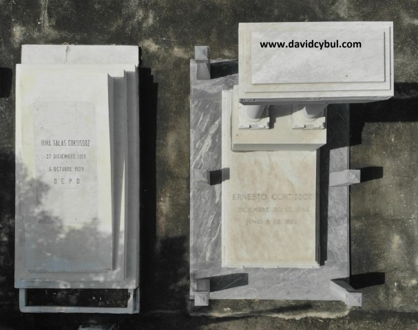 Foto de la Tumba de Ernesto Cortissoz, en el cementerio Judio Sefaradi dee Barranquilla